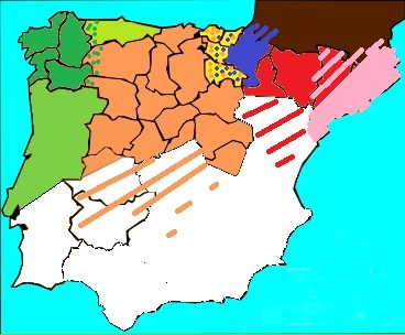 Zonas del Románico en la Península Ibérica: Románico Gallego, Románico Asturiano, Románico portugués, Románico castellano-leonés, Románico navarro, Románico aragonés y Románico catalán. Románico vasco y Románico riojano aparecen como zona intermedia, entre Castilla y Navarra.